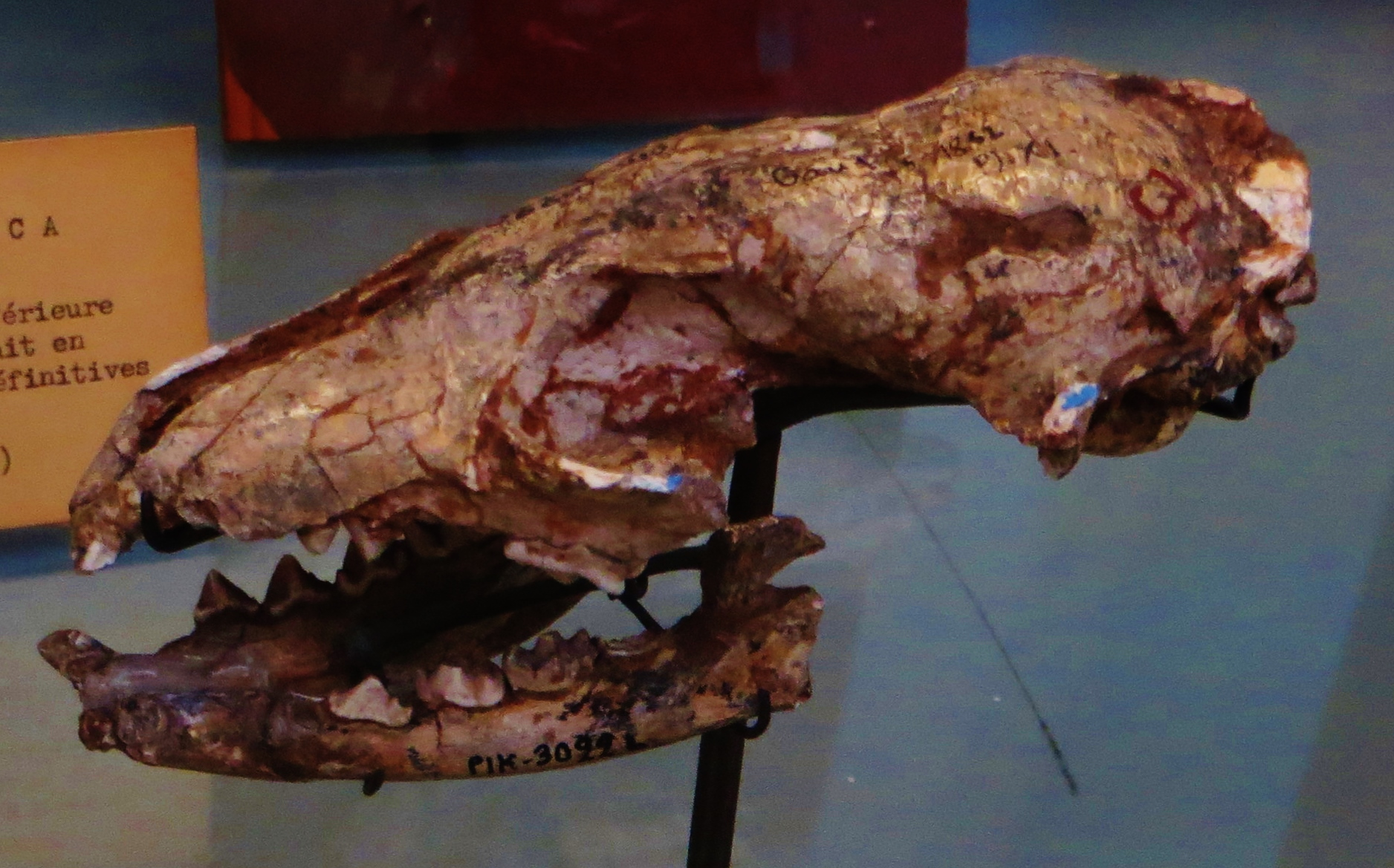 Fossil of Ictitherium, an extinct mammal- Took the photo at Musee d'Histoire Naturelle, Paris